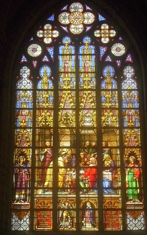 Bruksela, witraż w katedrze